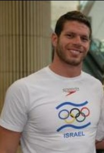 שחיין העבר תום בארי